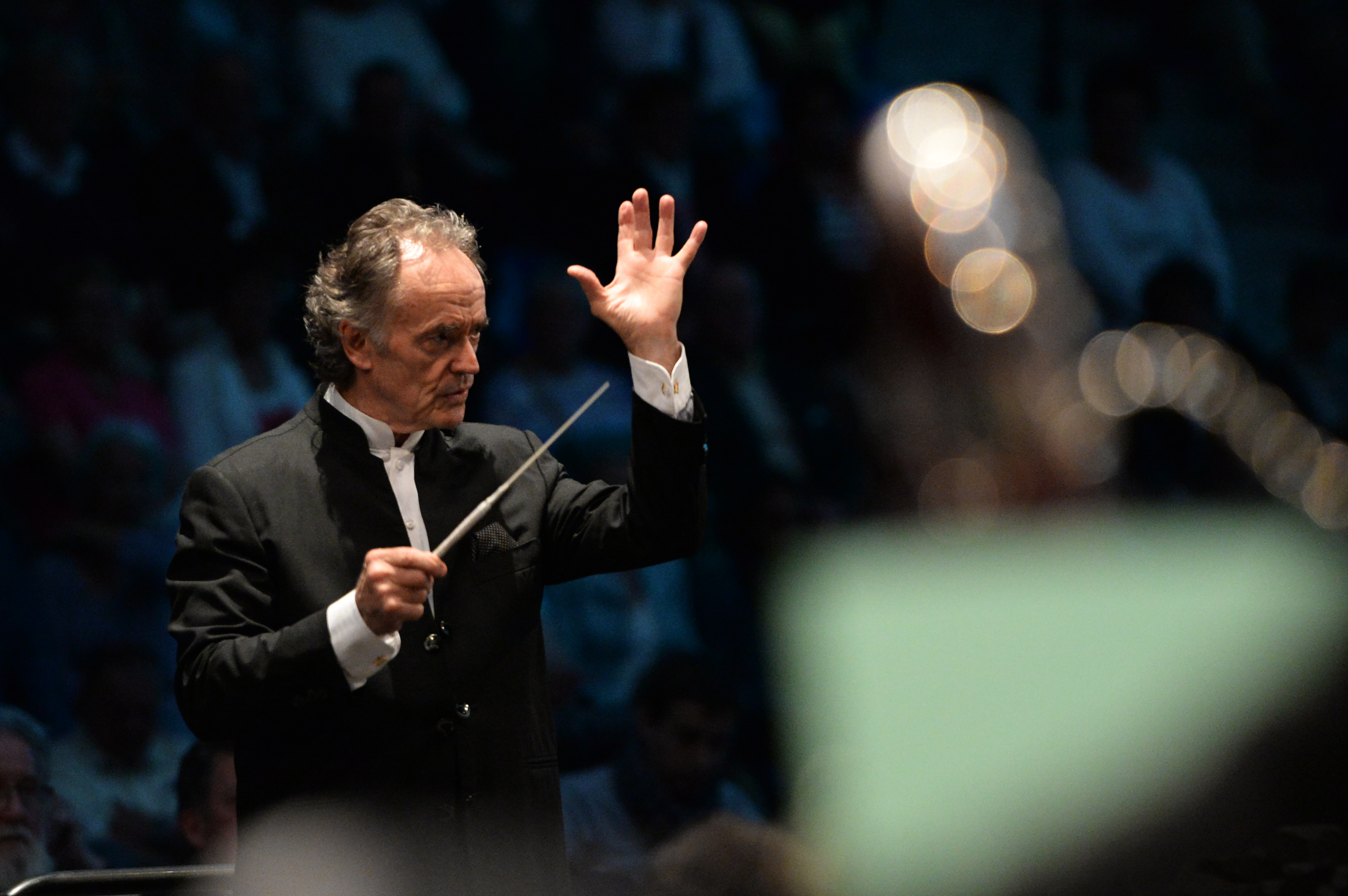 BRAHMS Johannes, Concerto pour violon et orchestre, en ré majeur (op. 77) STRAVINSKY Igor, Le Sacre du Printemps avec l'orchestre national de lille, Renaud Capuçon et Laurent Korcia